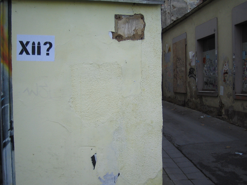 Logo der Initiative 12 Kugeln – 12 Fragen zur Klärung der Todesumstände von Tennessee Eisenberg auf einer Hausmauer in Regensburg